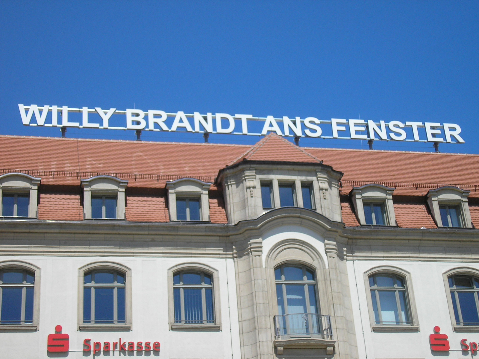 Das Willy-Brandt-Denkmal auf dem Dach des Erfurter Hofs in Erfurt.